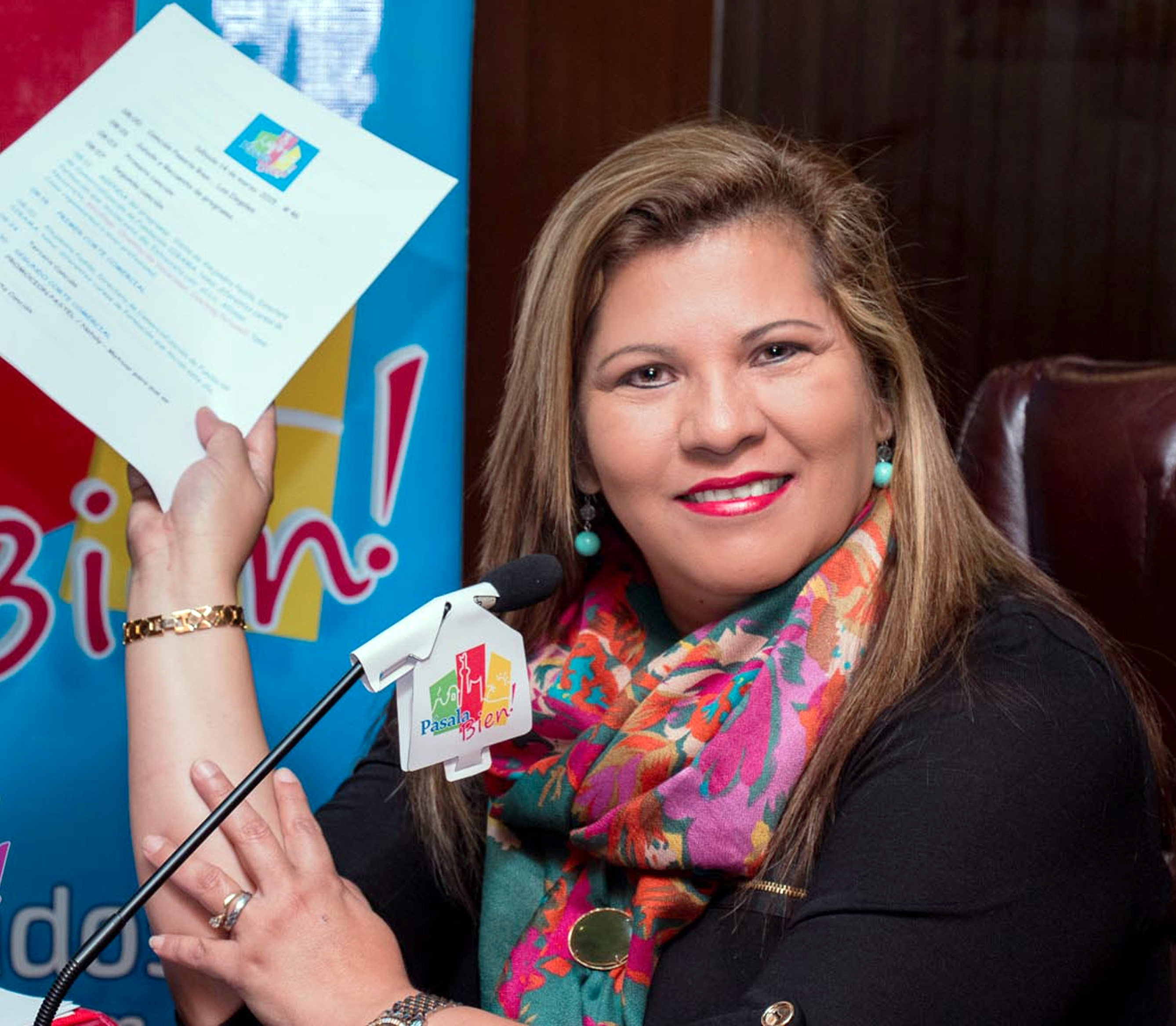 Isabel Ruiz, Periodista y Publirelacionista Salvadoreña